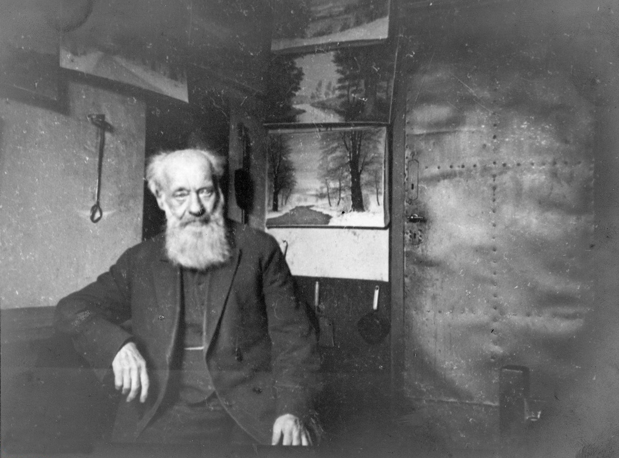 Maleren H.P. Carlsen i sin celle på Odense Arbejdsanstalt ca 1925